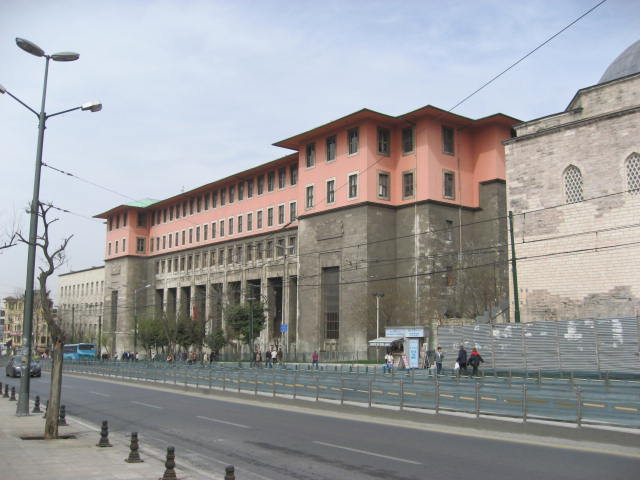 Istanbul University Edebiyat Fakültesi at Ordu Caddesi.